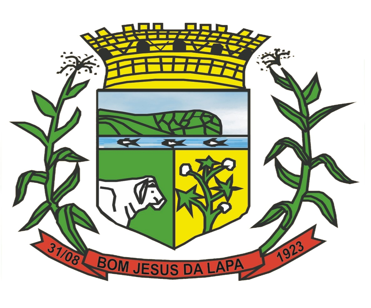 Brasão do Município de Bom Jesus da Lapa-Bahia